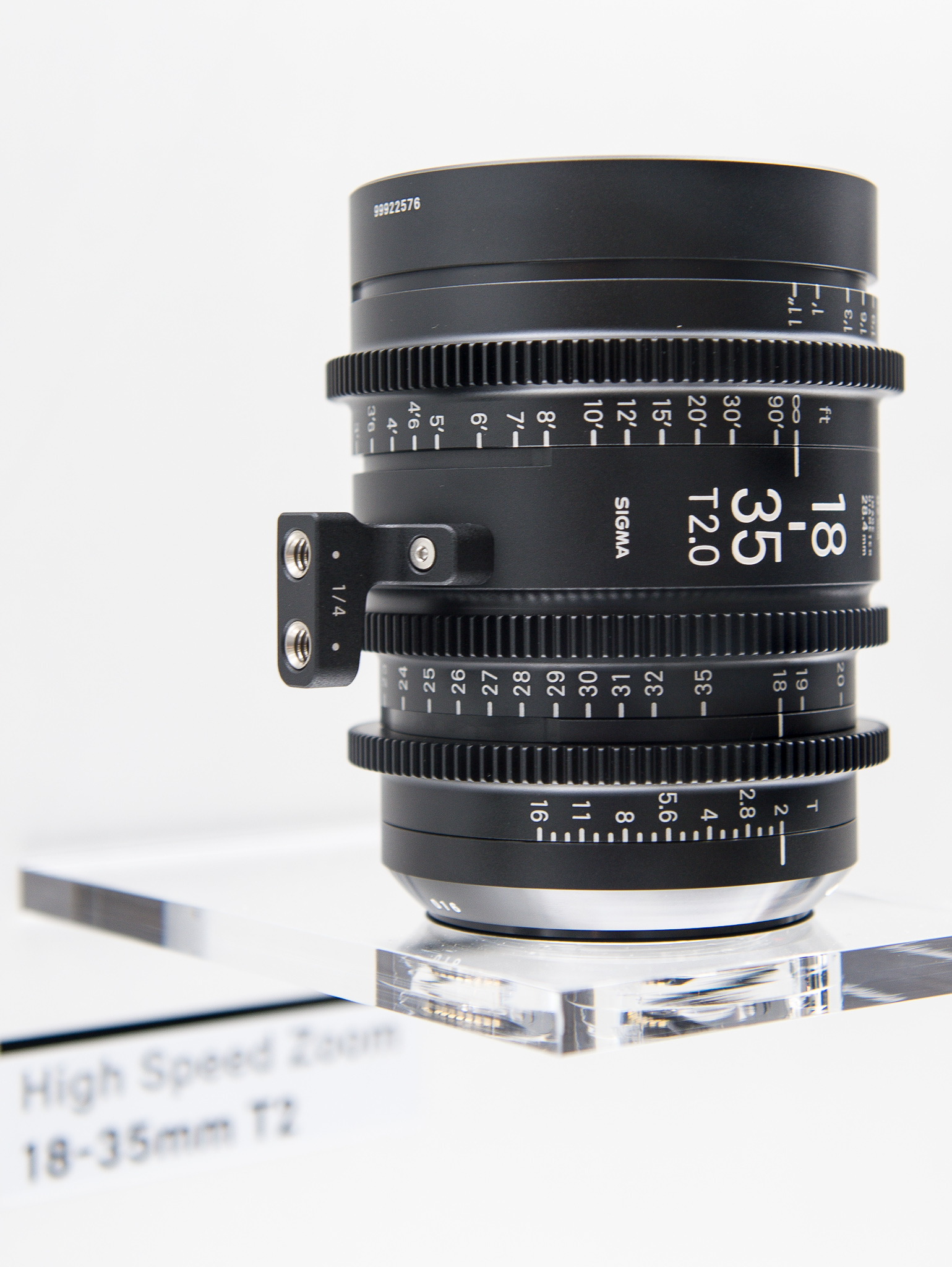 18-35mm T2,Kölnmesse,Objektiv,Photokina 2016,Sigma